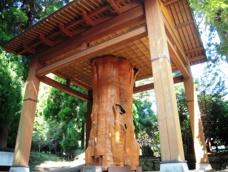 国造神社にある保存後の手野の杉（熊本県阿蘇市）